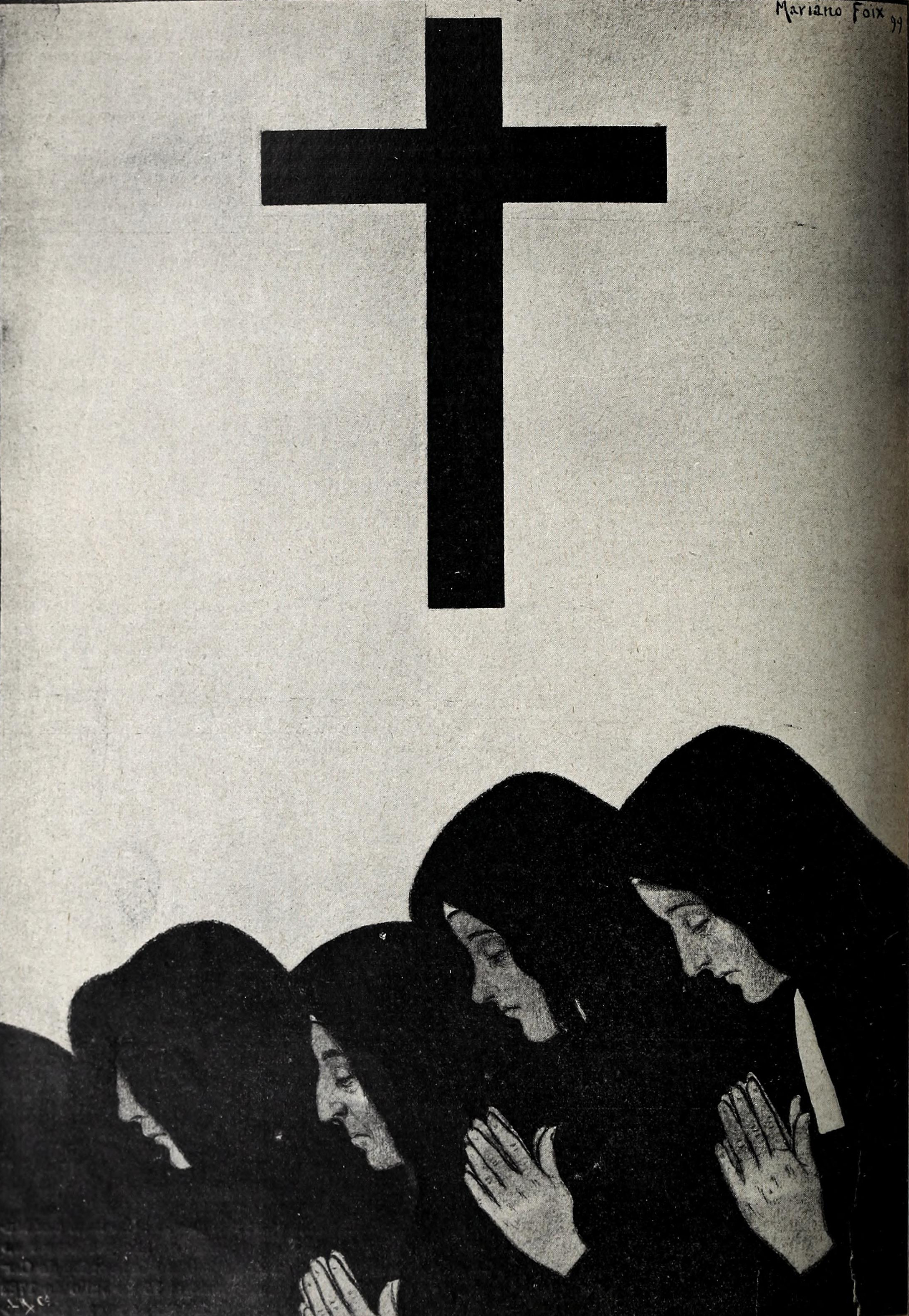 Páginas artísticas. Devoción.